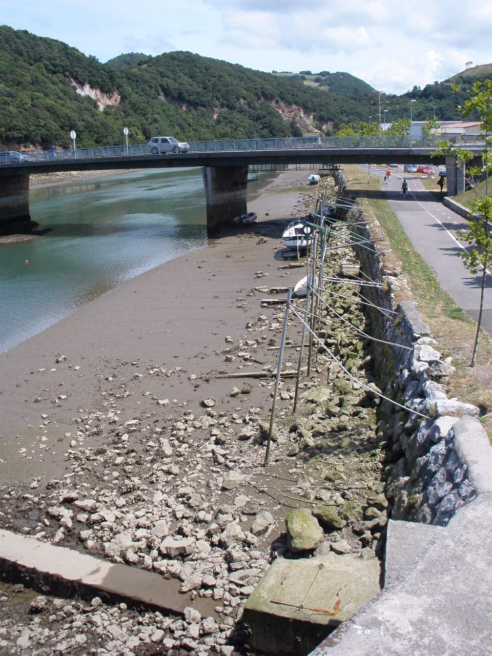 Ría del Urola con marea baja, Zumaia